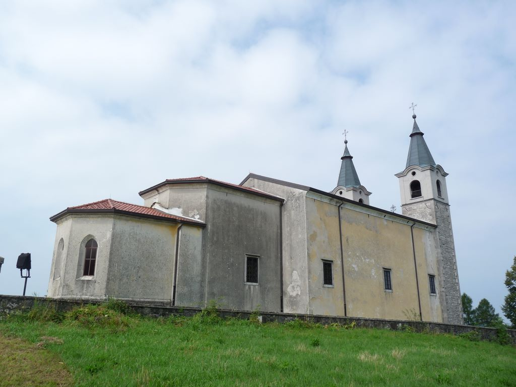 Marijino Celje na Kanalskem Kolovratu